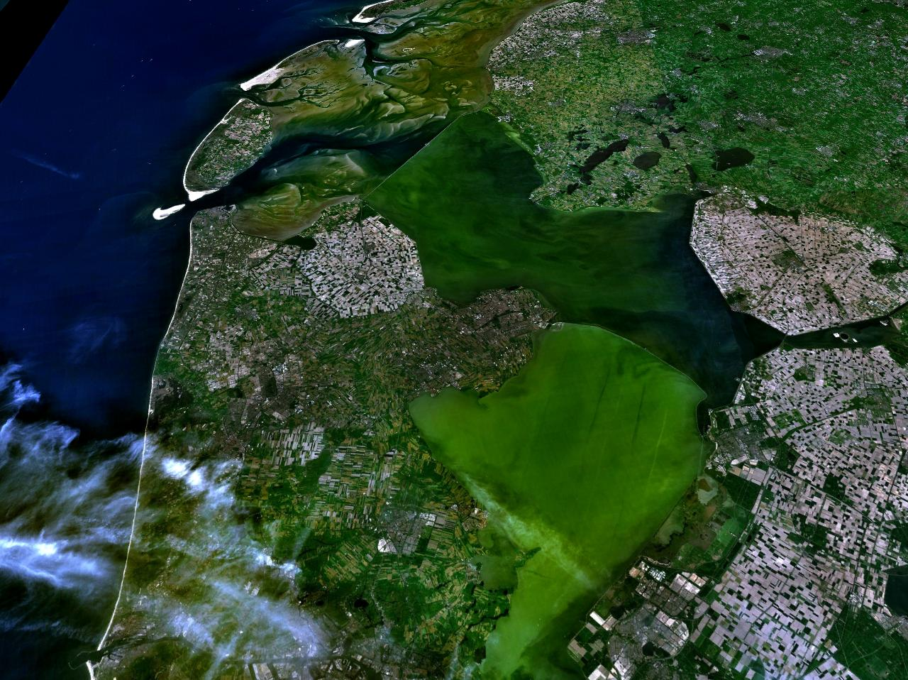 Satellietfoto van Noord-Holland, IJselmeer, Friesland.